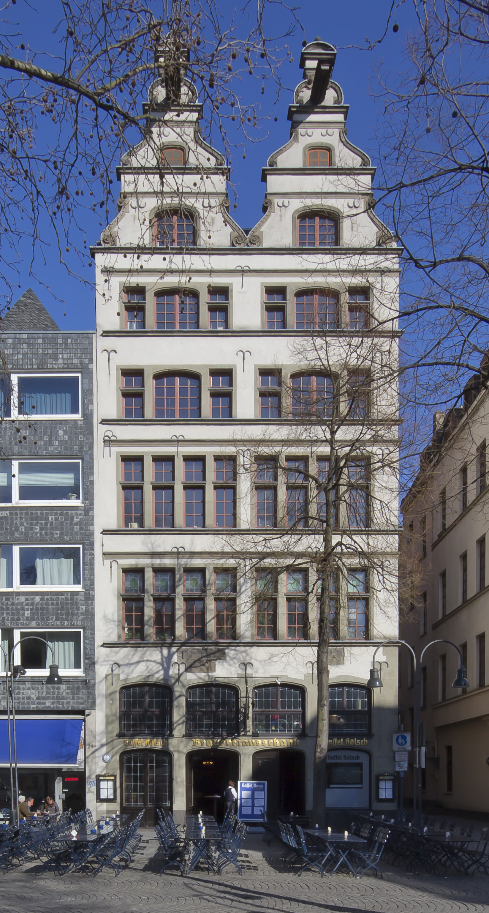 Denkmalgeschütztes Wohn- und Geschäftshaus „Gaffel Haus“, Alter Markt, Köln